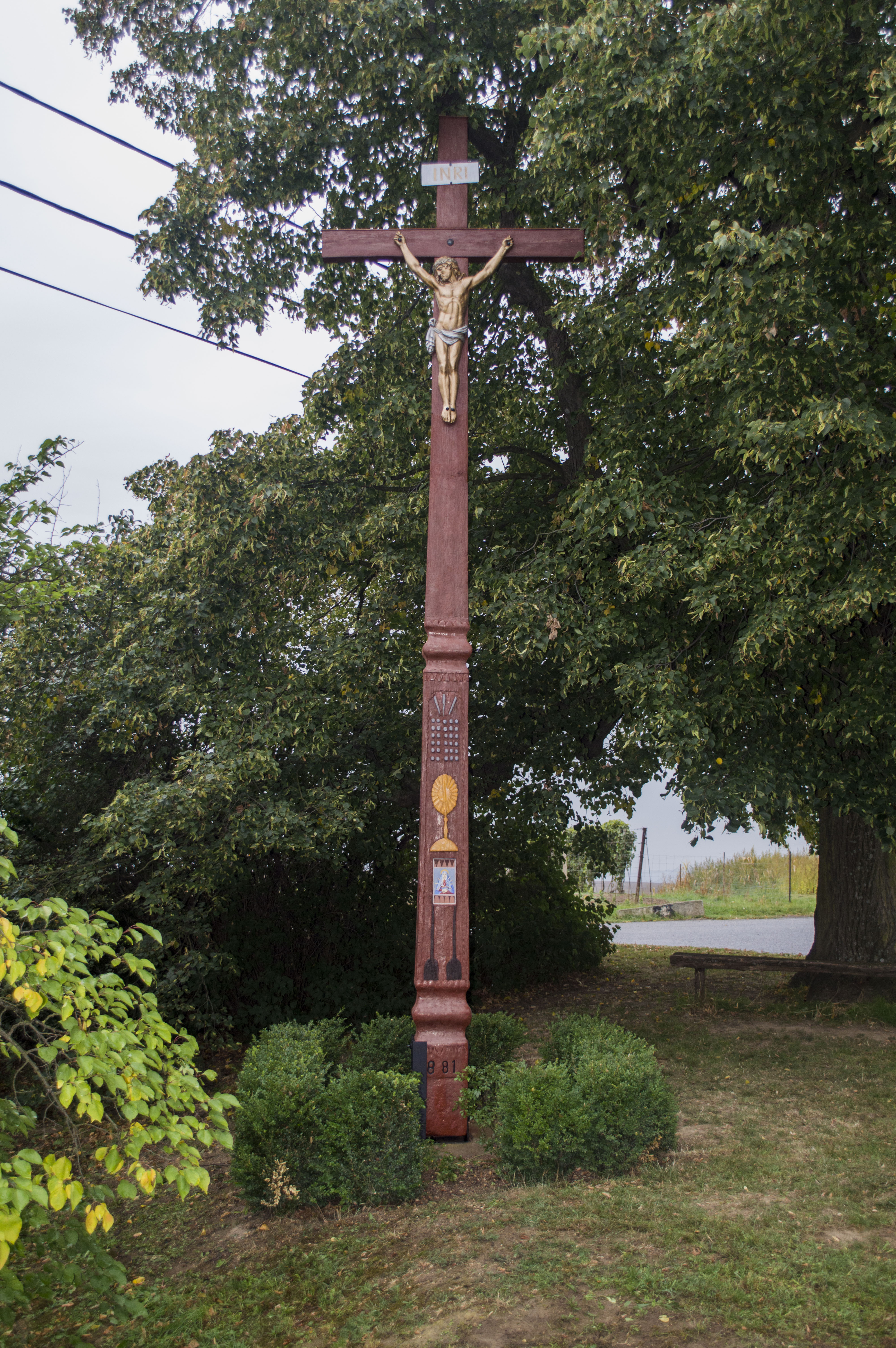 Kříž v Novém Poddvorově